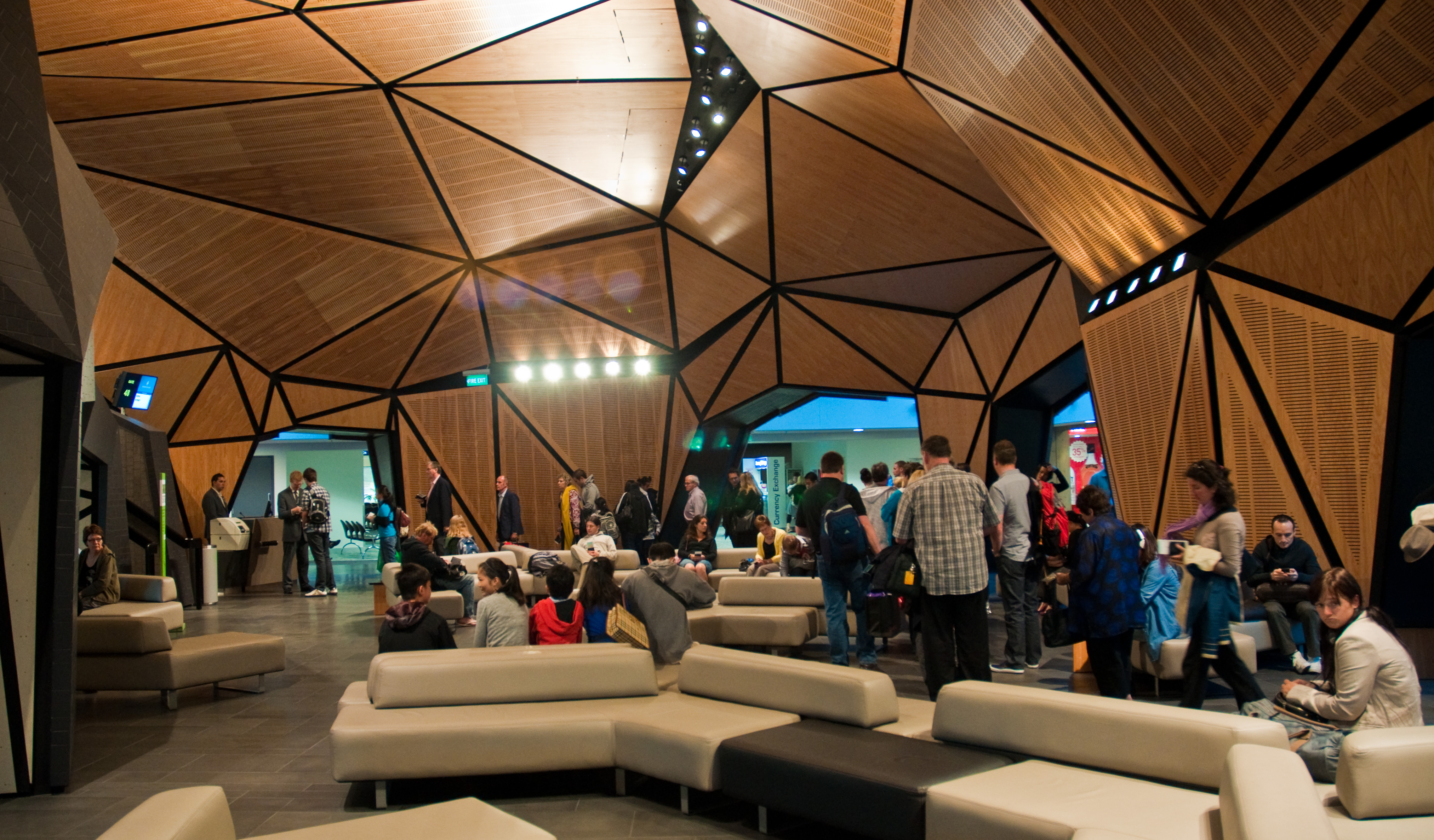 Boarding for Sydney